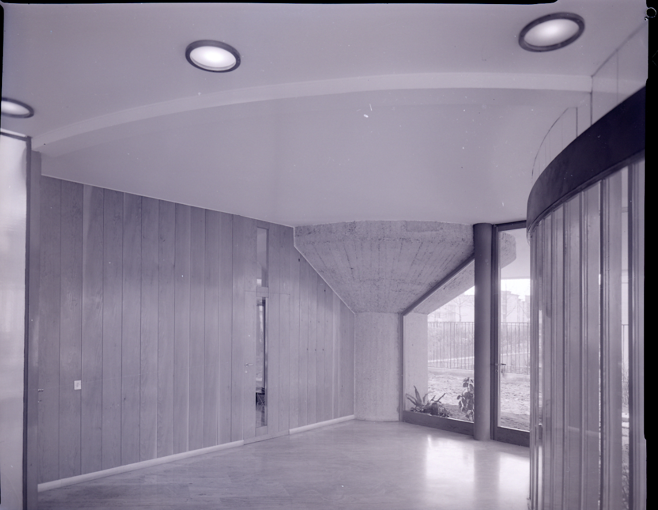 Servizio fotografico : Milano, 1963 / Paolo Monti. - Buste: 17, Fototipi: 17 : Negativo b/n, gelatina bromuro d'argento/ pellicola ; 10x12. - ((Serie costituita da 17 buste sciolte di negativi identificati con una doppia numerazione (da 44368 a 44392): 24565, 24566, 24567, 24568, 24569, 24570, 24571, 24572, 24573, 24574, 24575, 24576, 24577, 24578, 24579, 24580, 24581, 24582, 24583, 24584, 24585, 24586, 24587, 24588, 24589. - Sulla busta identificata con il n. 24565 iscrizione didascalica manoscritta a pennarello. - La doppia numerazione potrebbe corrispondere ai lavori realizzati durante il periodo di attività del laboratorio e studio fotografico "Foto Studio 22", società che risulta essere stata aperta il 10/04/1961, con partecipazione, nel ruolo di gerente, di Vincenzo Carrese. - Fonte: Rubrica di Paolo Monti: Archivio fino 1-4-1961/ 31-3-1963 (1961-1963), presso Archivio Paolo Monti